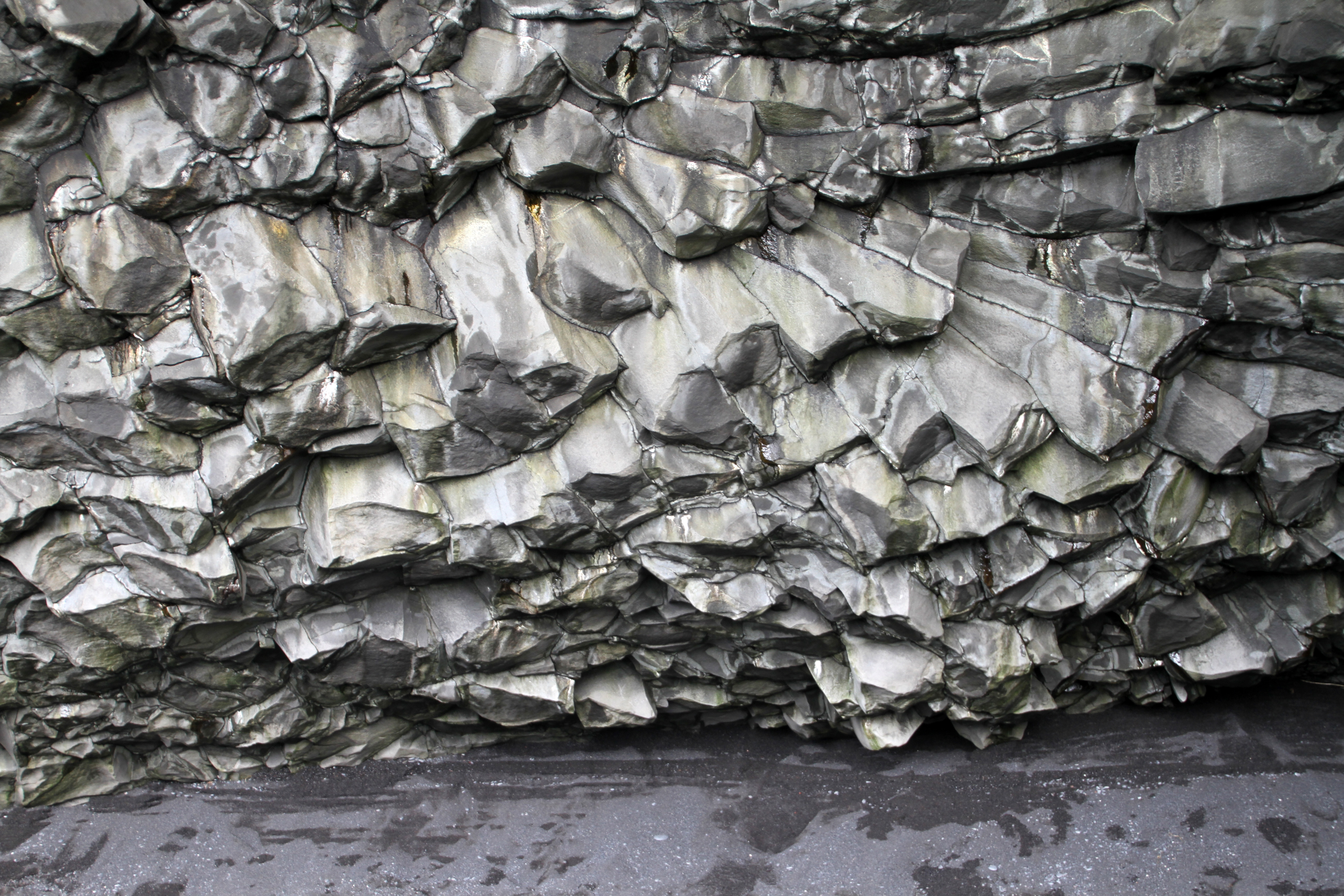 Reynisfjara